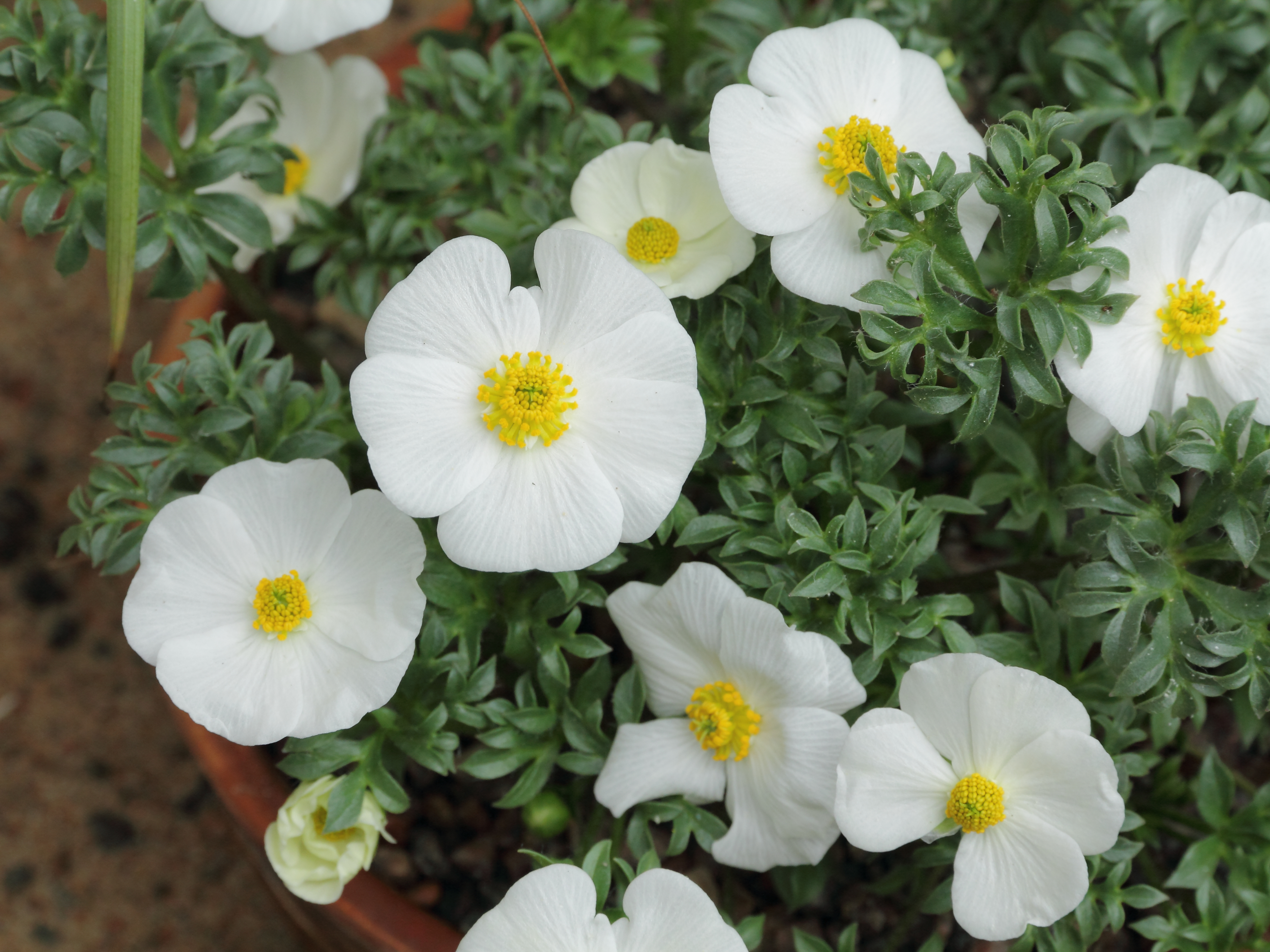 Ranunculus seguieri i Göteborgs Botaniska Trädgård.